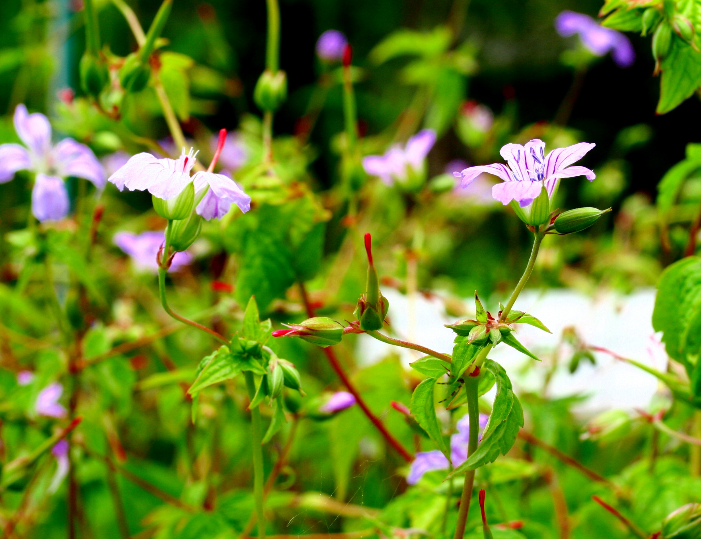 Geranio nodoso - Località Giardino Botanico Alpino "Giangio Lorenzoni", Pian Cansiglio, Tambre d'Alpago (BL), 1000 m s.l.m.